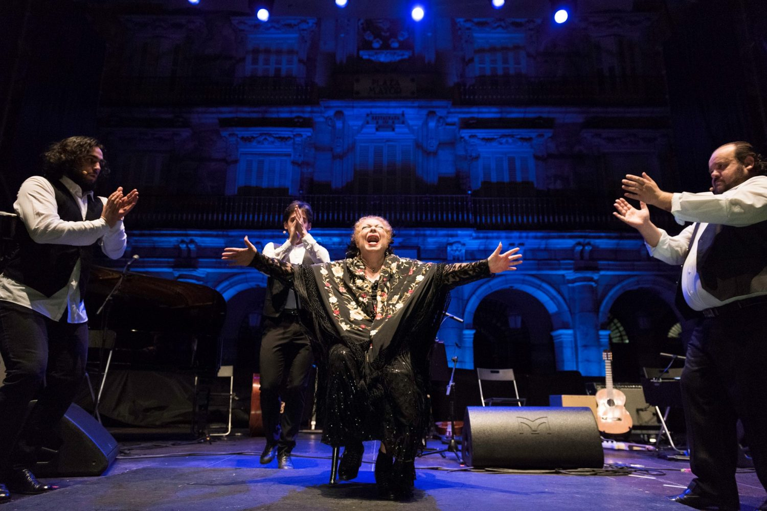 Las mujeres músicas también han alzado su voz en las celebraciones en torno al Día Internacional de la Mujer. Este sábado, 10 de marzo, la Plaza Mayor ha albergado el concierto Un susurro atronador cuyo hilo conductor han sido las mujeres como intérpretes, como compositoras, como creadoras. El espectáculo ha contado con las jóvenes voces de Andrea Motis, Rita Payes y Magalí Datzira, que han ofrecido su personal interpretación de grandes figuras del jazz, como Billie Holiday o Nina Simone. La italiana Cristina Zavalloni ha reivindicado a través de temas internacionales la resistencia de las mujeres frente a la desigualdad. Elsa Rovayo, “La Shica” ha ofrecido la visión del coraje femenino a través de la copla.